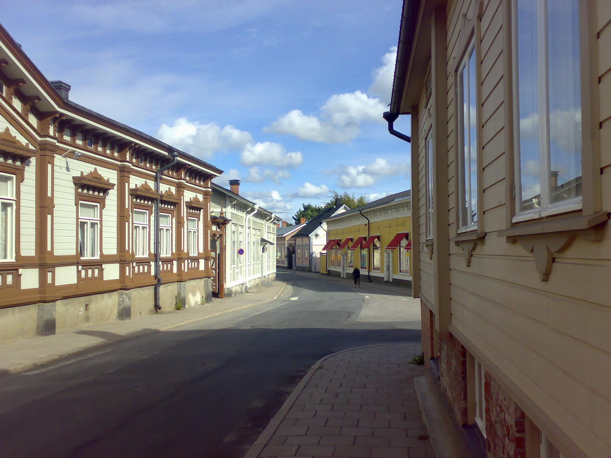 Old Rauma